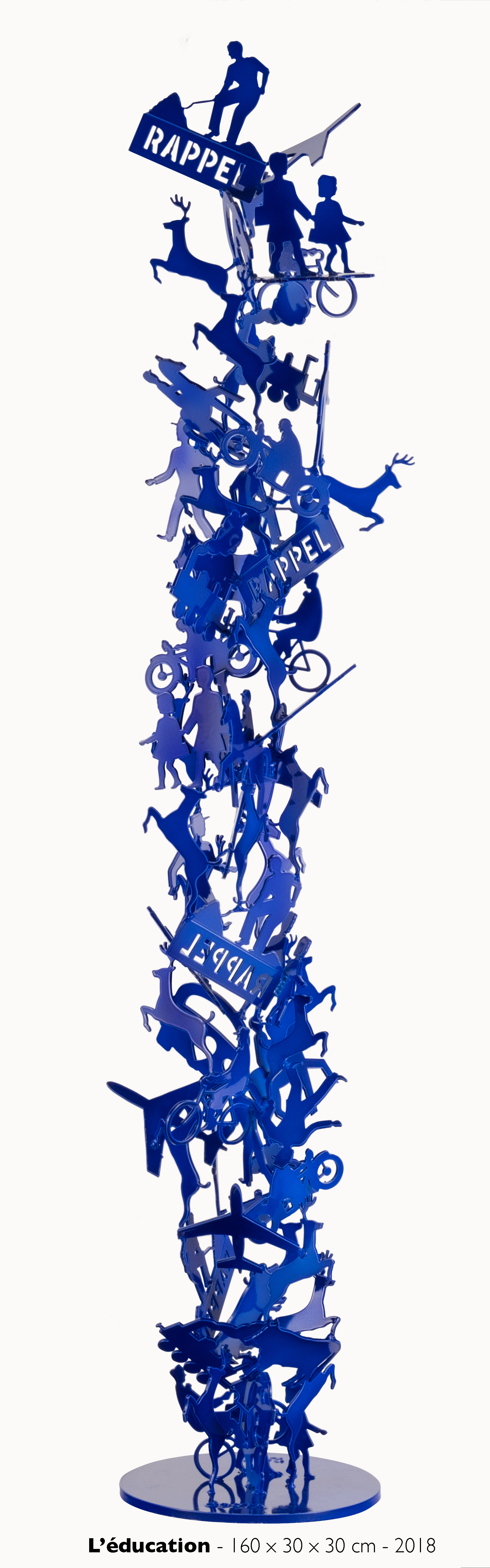 sculpture